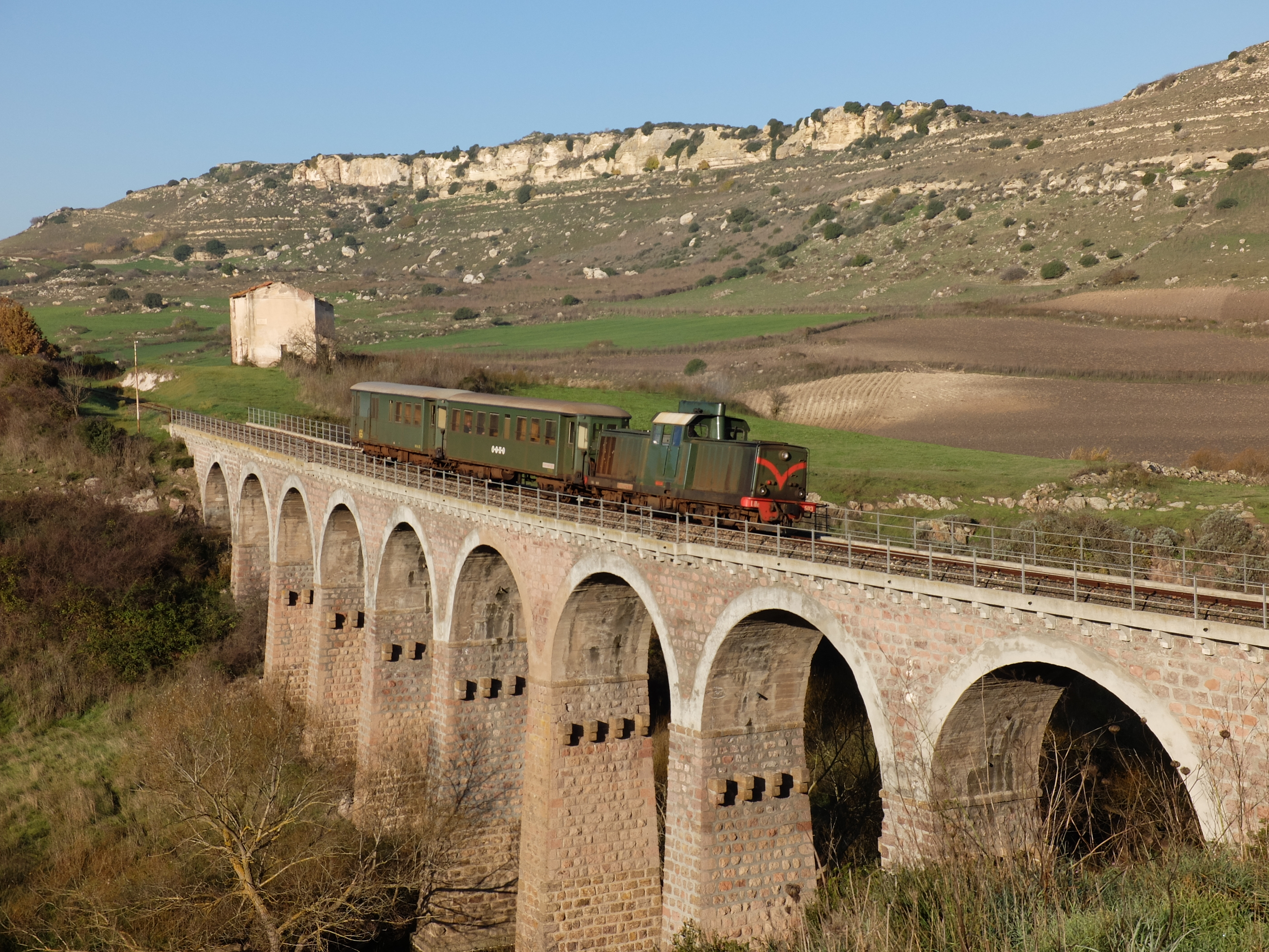 LDe 503 mit Sonderzug auf dem Viadukt zwischen Nulvi und Martis